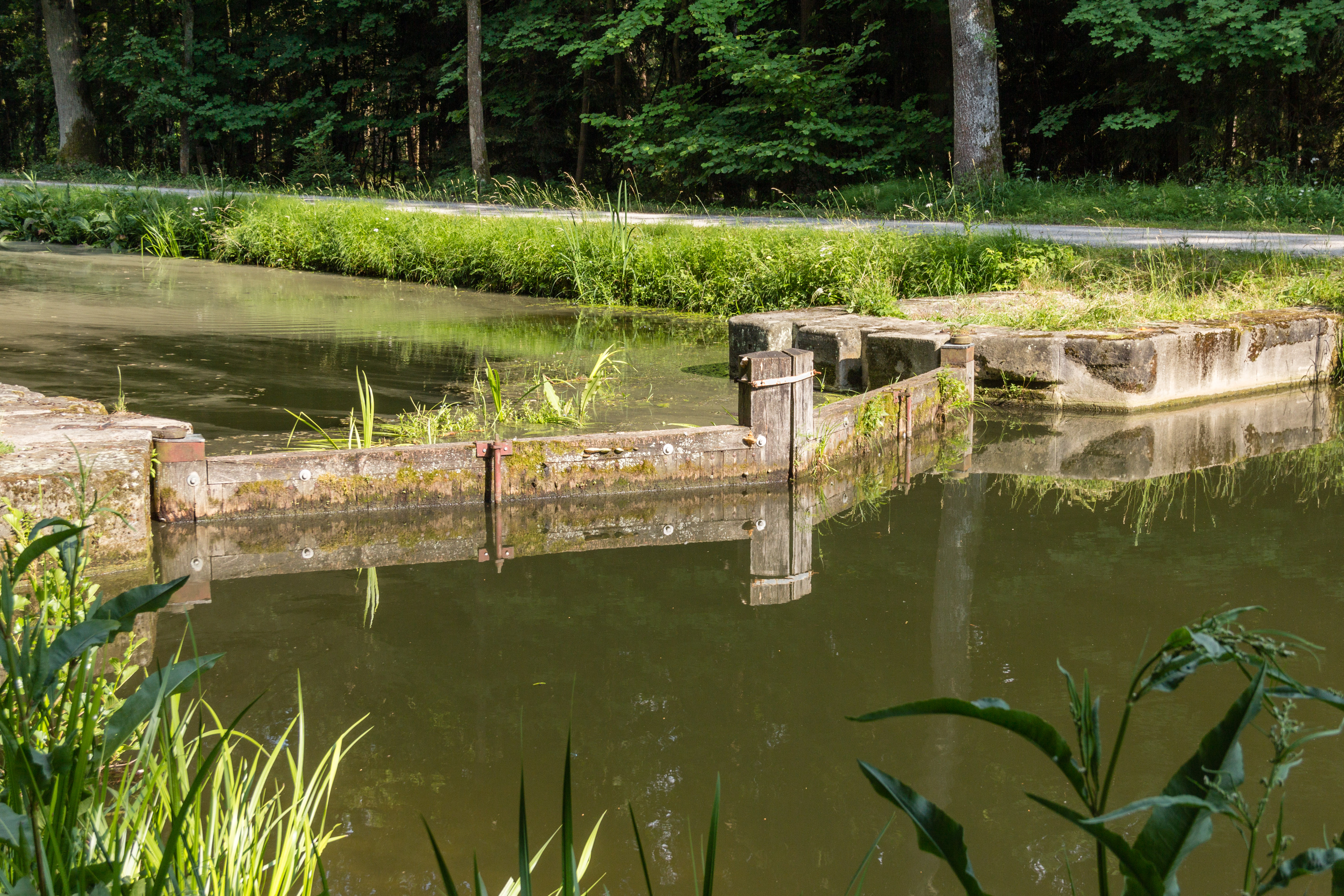 Ludwig-Donau-Main-Kanal, Sicherheitstor, Forst Kleinschwarzenlohe